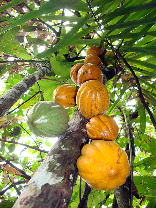 Reife Kakaofrüchte am Kakao-Baum